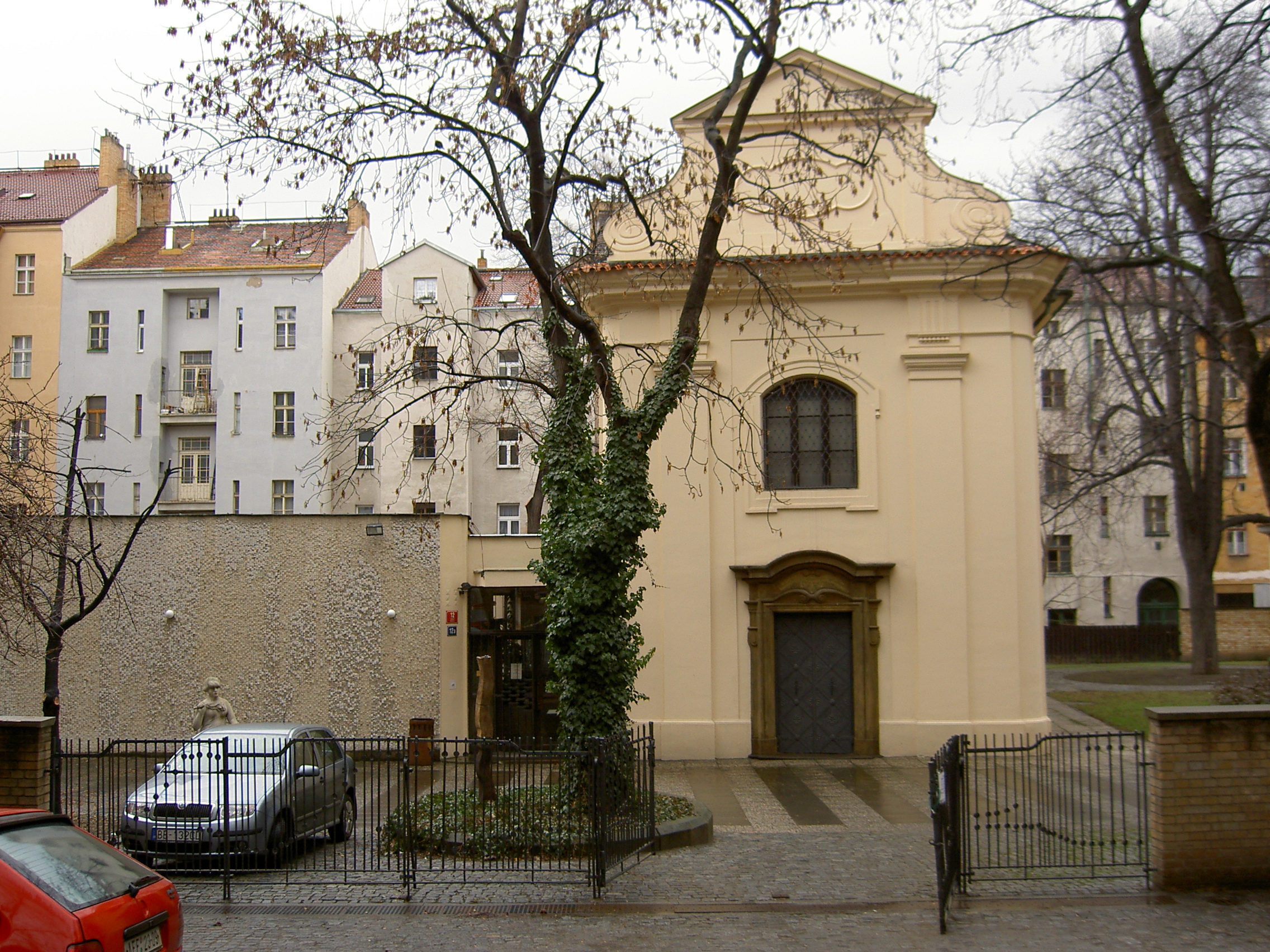 Kostel svatého Kříže na Žižkově